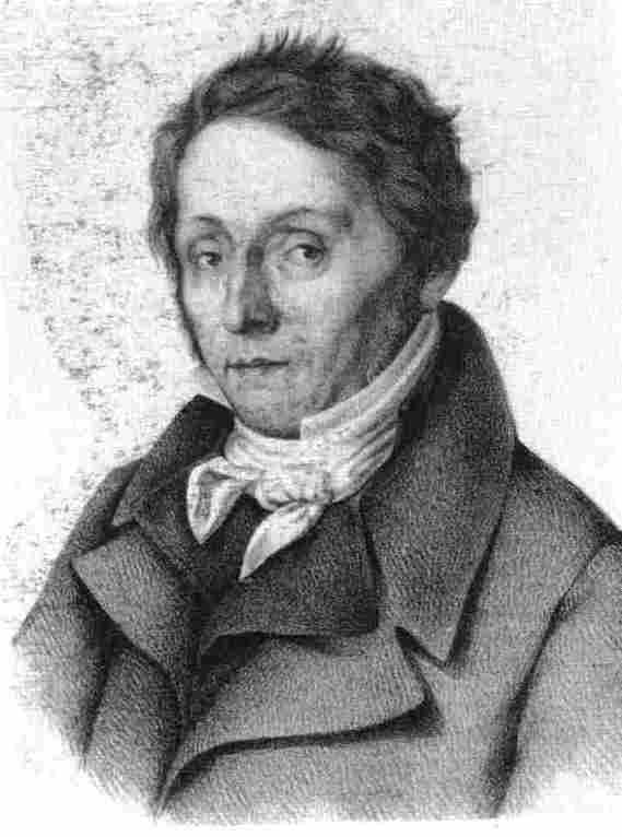 Giovan Battista Borghesi (1790-1846), pittore parmigiano.